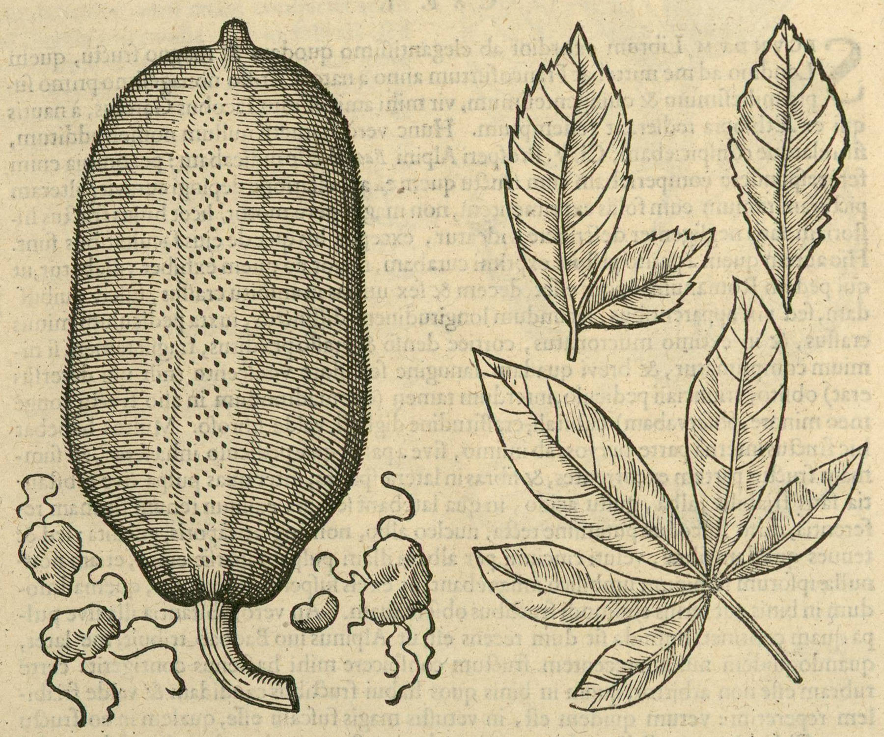 Adansonia digitata - Frucht und Blatt